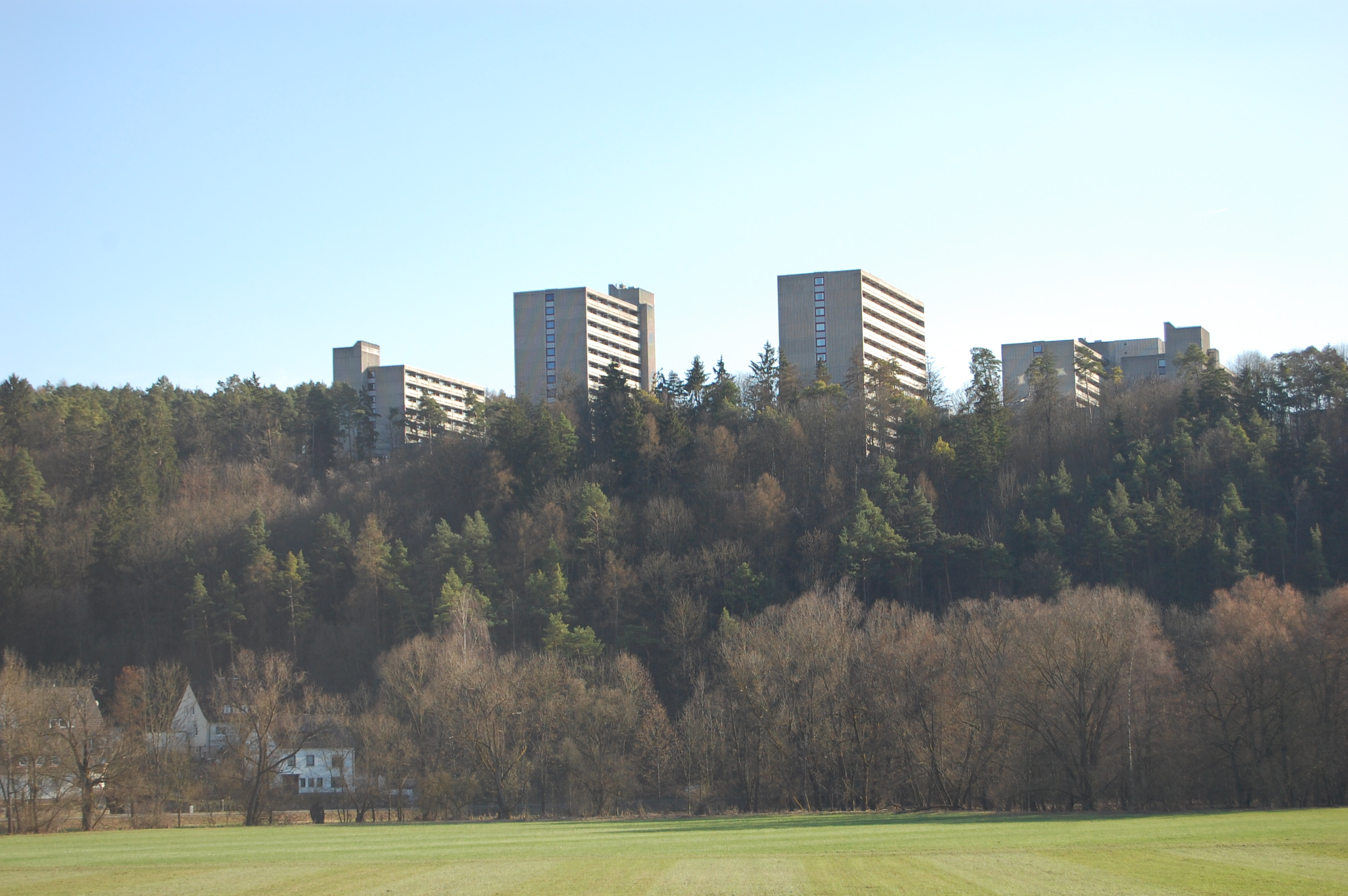 Herschfeld, Bad Neustadt an der Saale, Rhön Klinikum